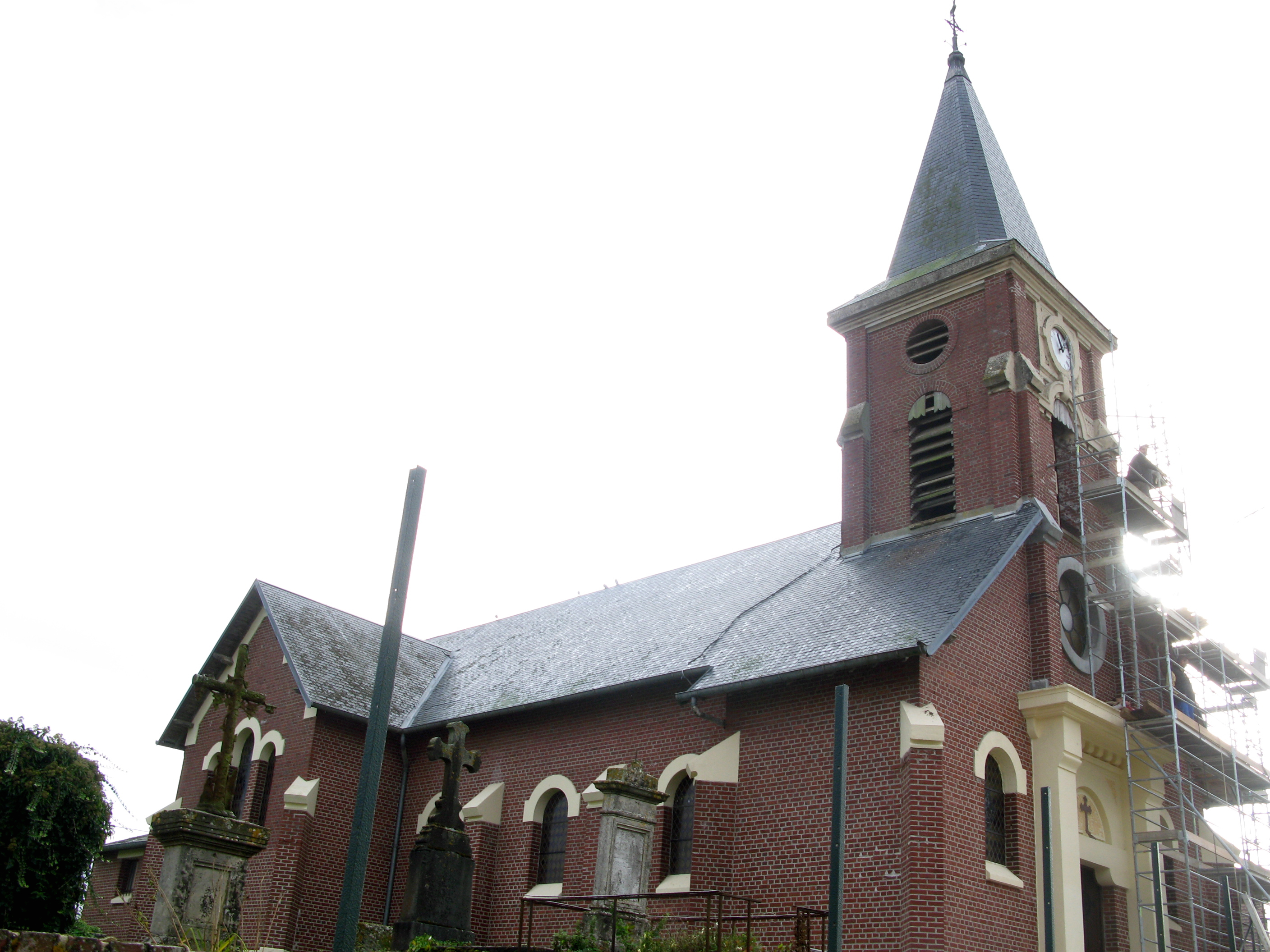 Maissemy (Aisne, France) - L'église est en travaux à l'automne 2009. . .